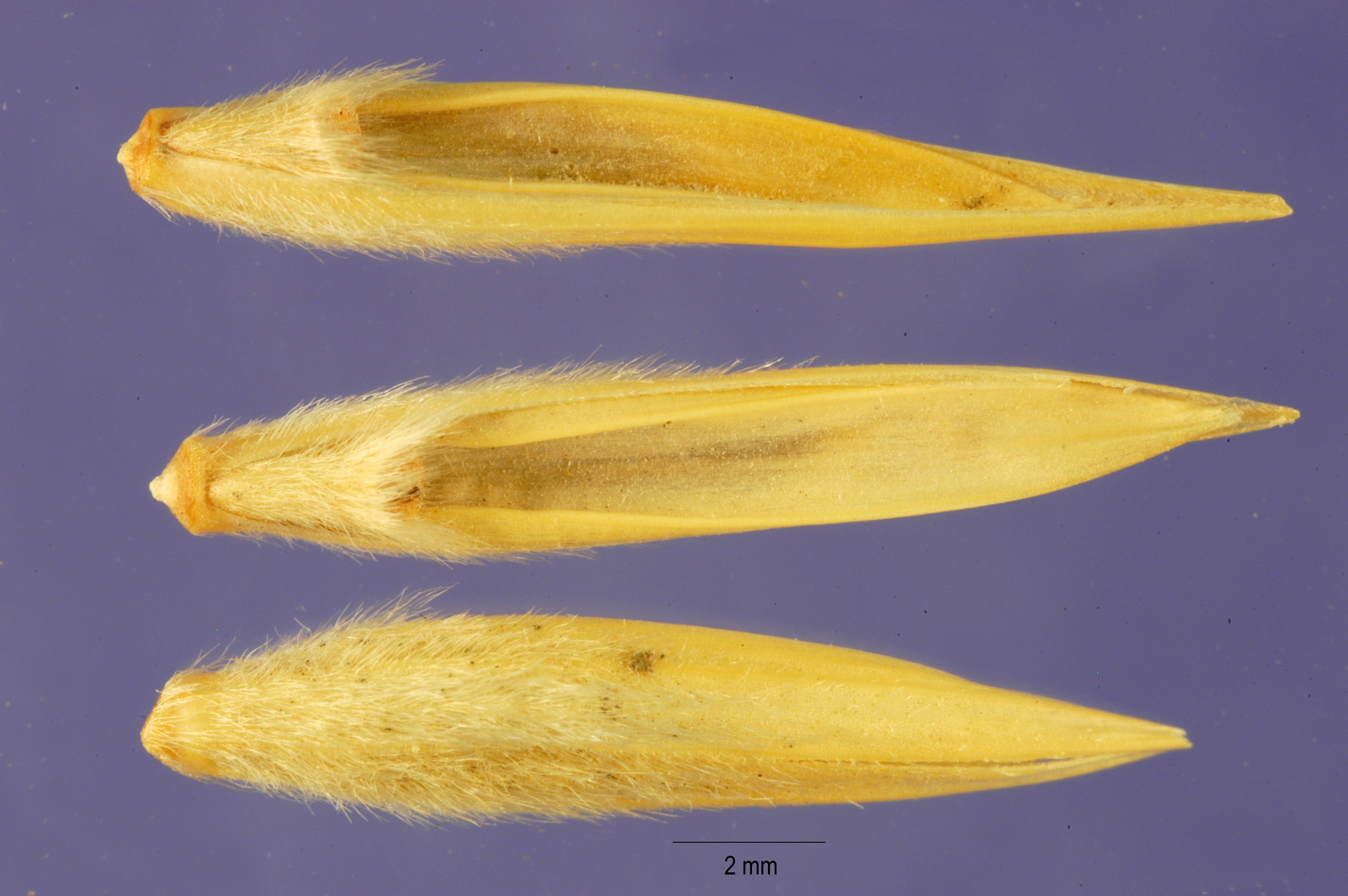 Leymus arenarius vrucht